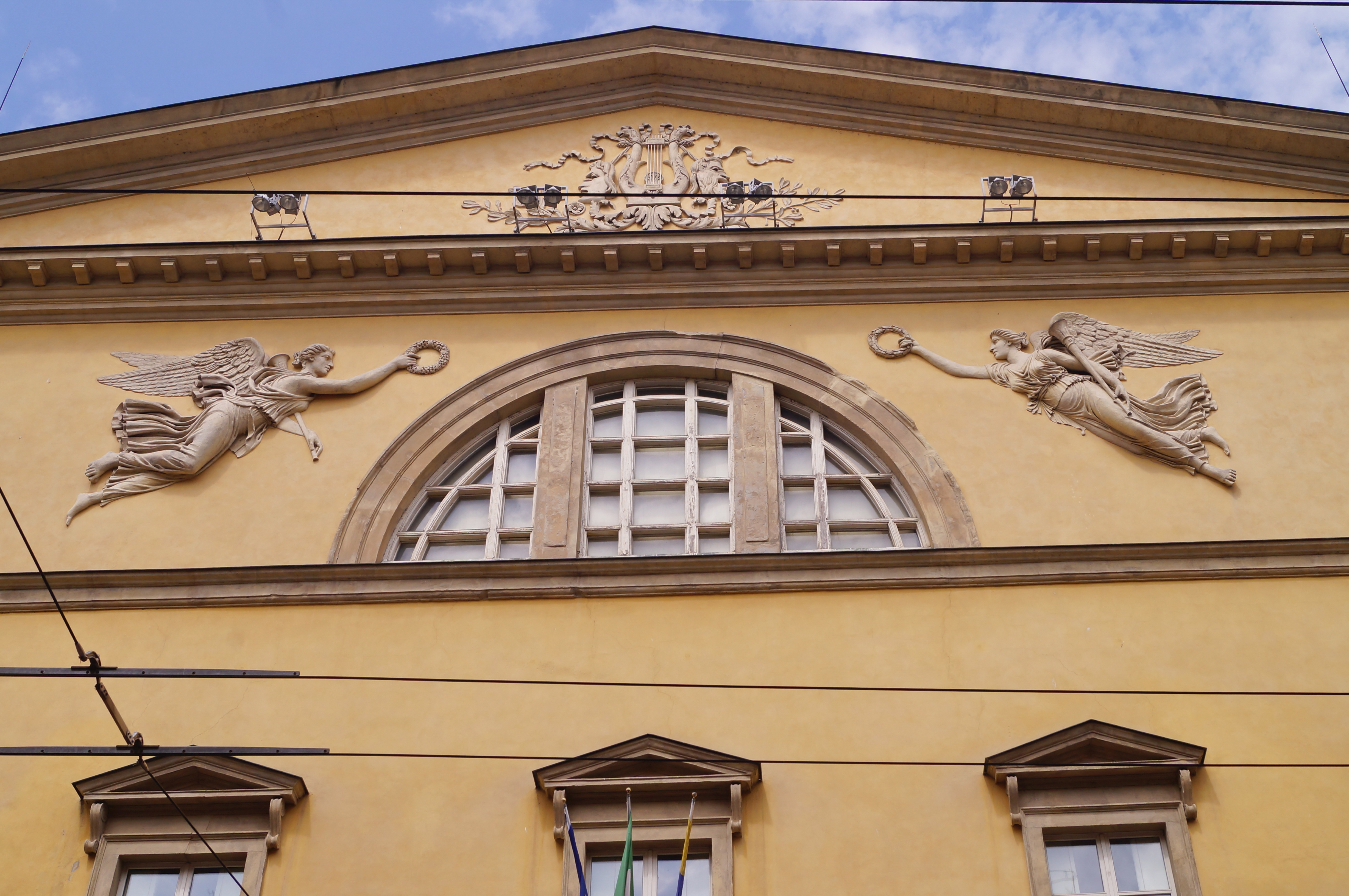 Teatro Regio (Parma) This is a photo of a monument which is part of cultural heritage of Italy.